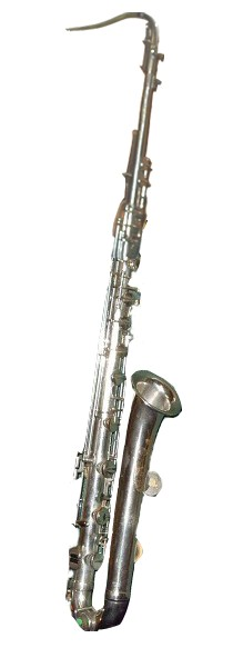 rothofon